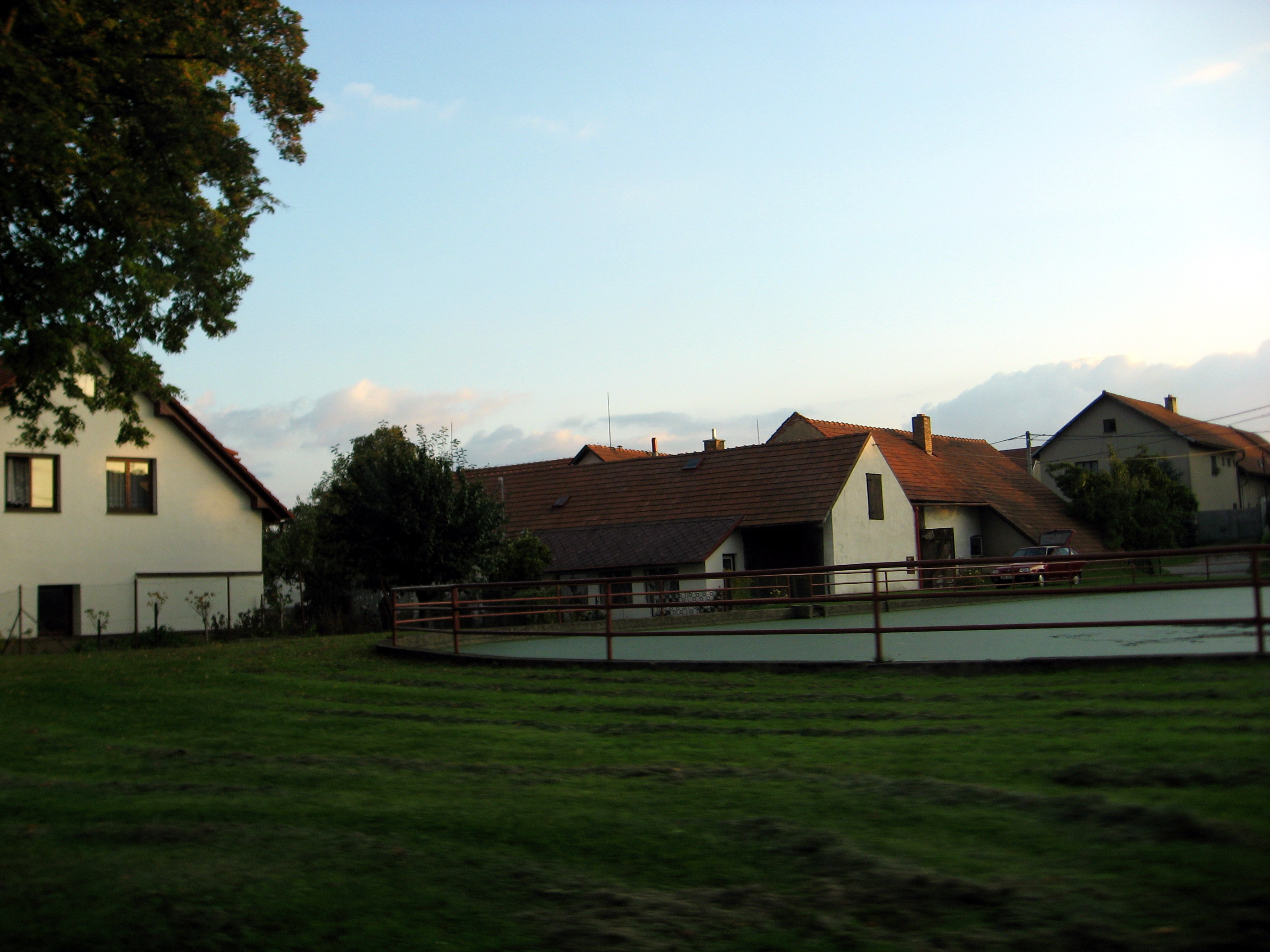 Nová Ves u Nového Města na Moravě